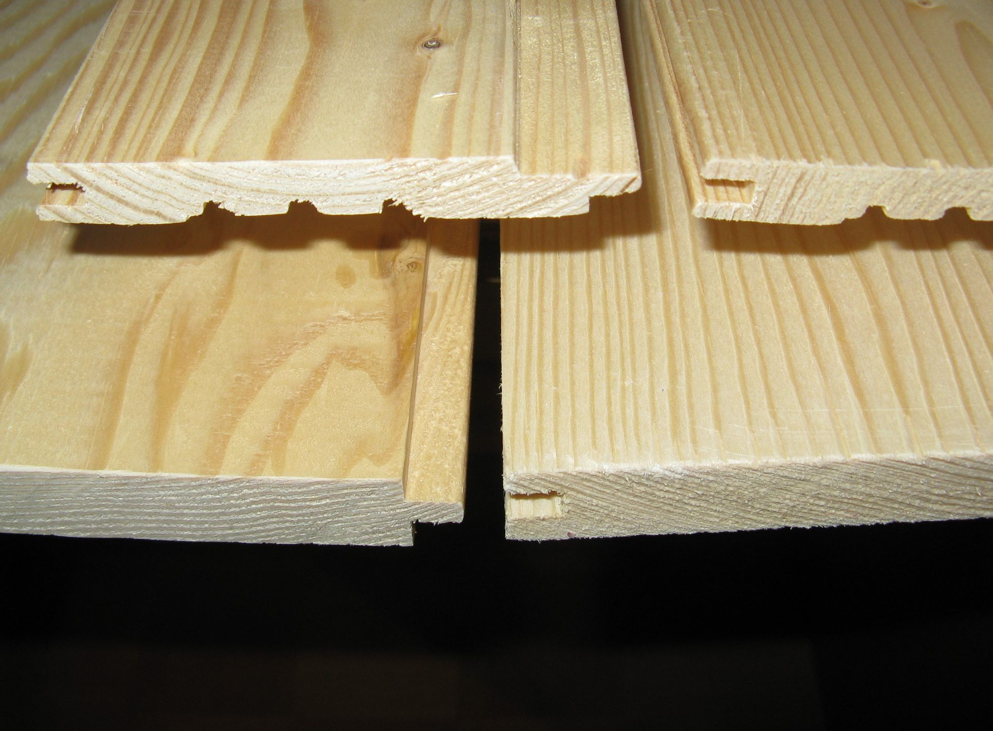 Verbindung zweier Bretter mit Spund und Nutoben: Täfer-Bretter; unten: Boden-Bretter